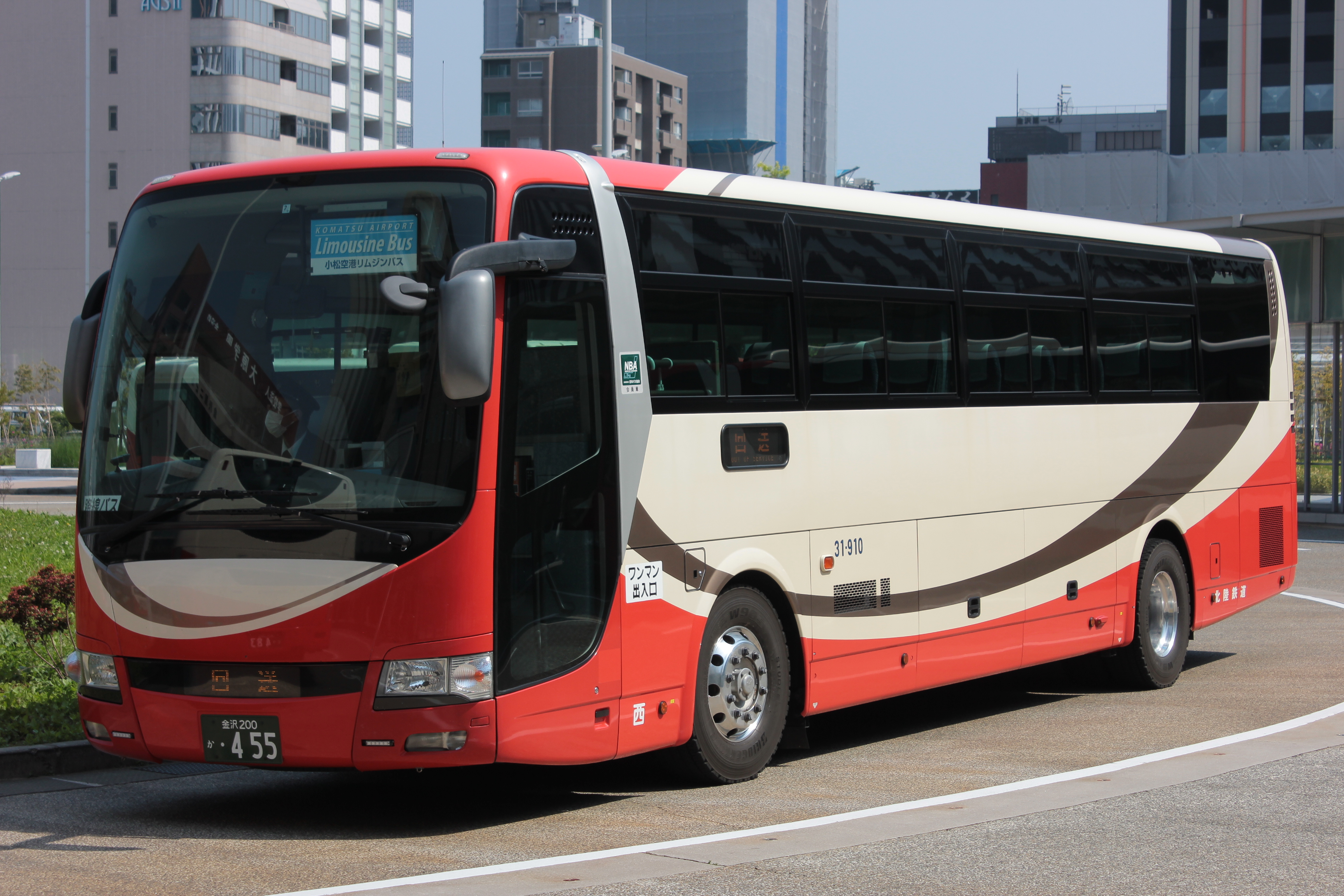 北陸鉄道の小松空港リムジンバス、金沢駅西口にて撮影。 Canon EOS Kiss X5